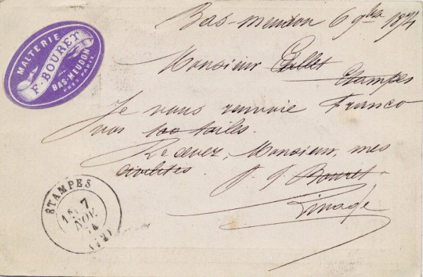 Carte postale de 1874, verso (collection Bernard Gineste)